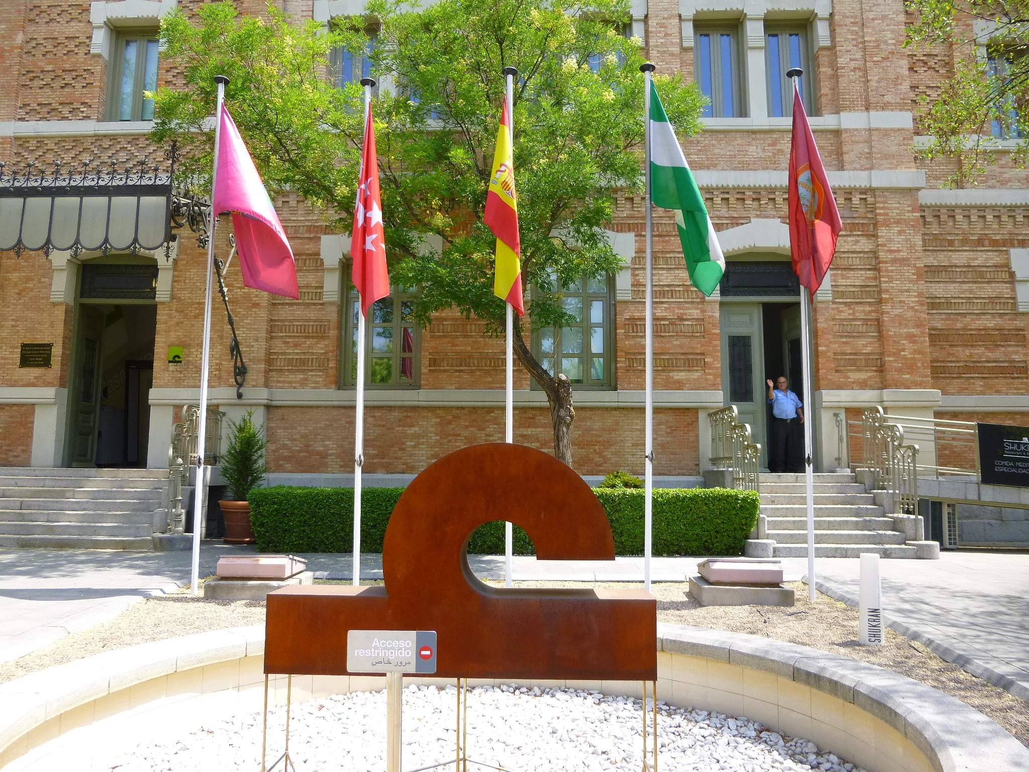 Casa Árabe e Instituto Internacional de Estudios Árabes y del Mundo Musulmán (Madrid)